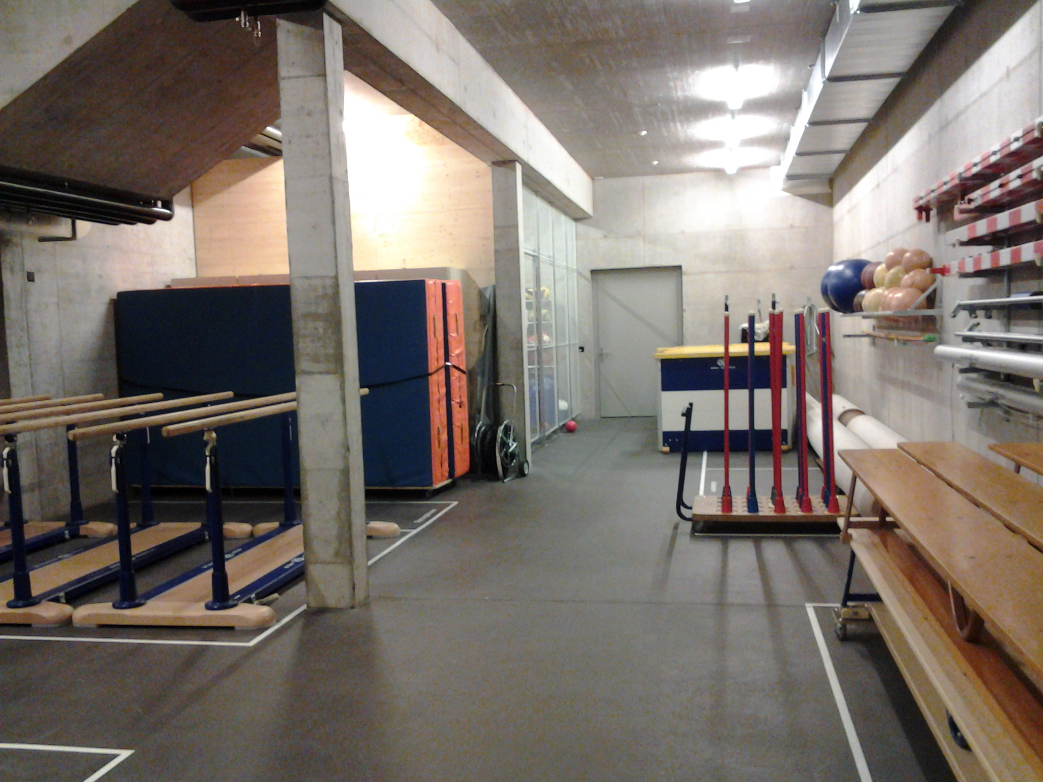 Komplettausstattung einer Turnhalle mit Geräten der Firma Alder + Eisenhut